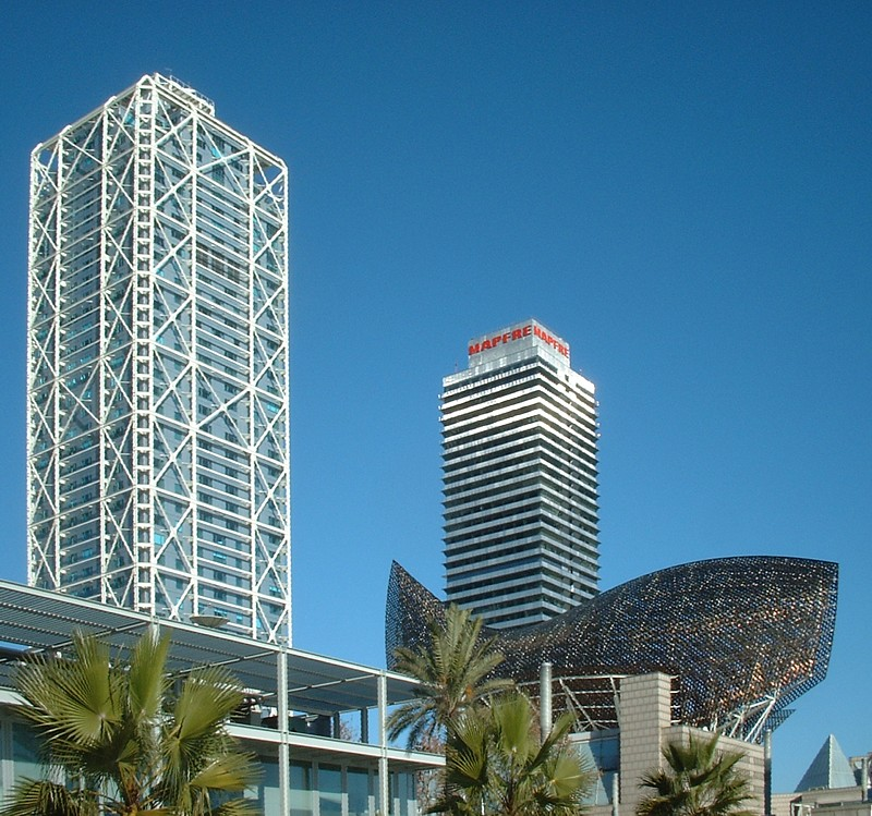 Hotel Arts e Torre Mapfre, Barcelona